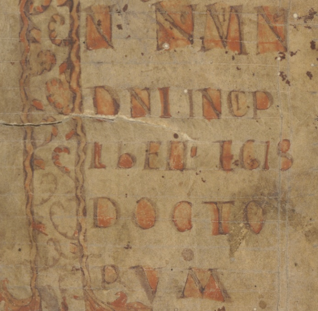 Bréviaire d'Alaric, Xème siècle. Bibliothèque du patrimoine de Clermont-Ferrand. Côte MS 201. Voir également Overnia, bibliothèque numérique.